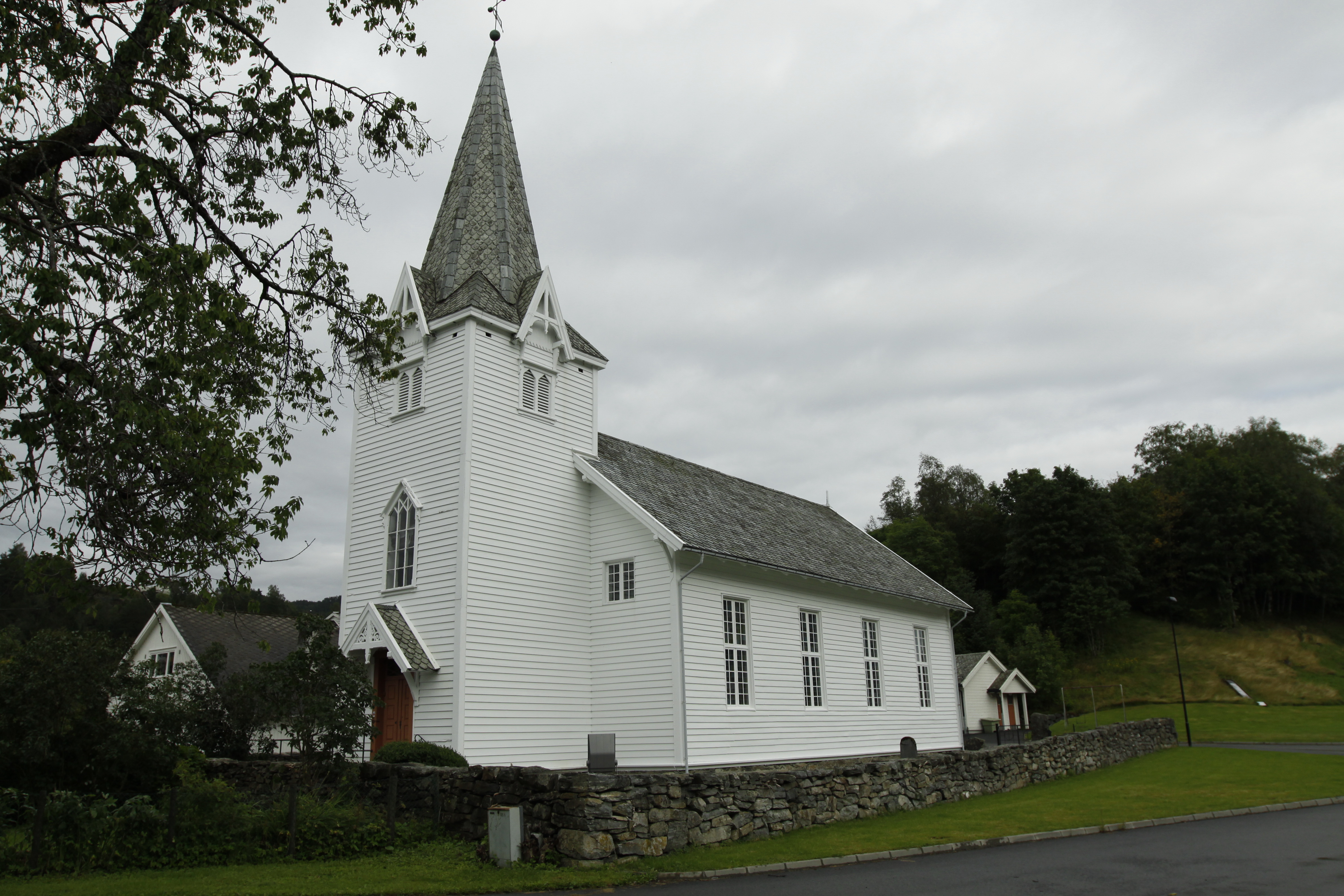 Suldal, Norway